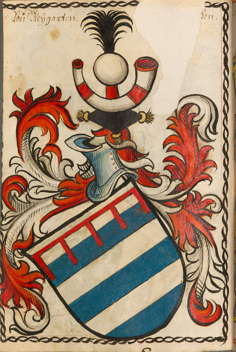 Scheibler'sches Wappenbuch , älterer Teil Franken Weingarten